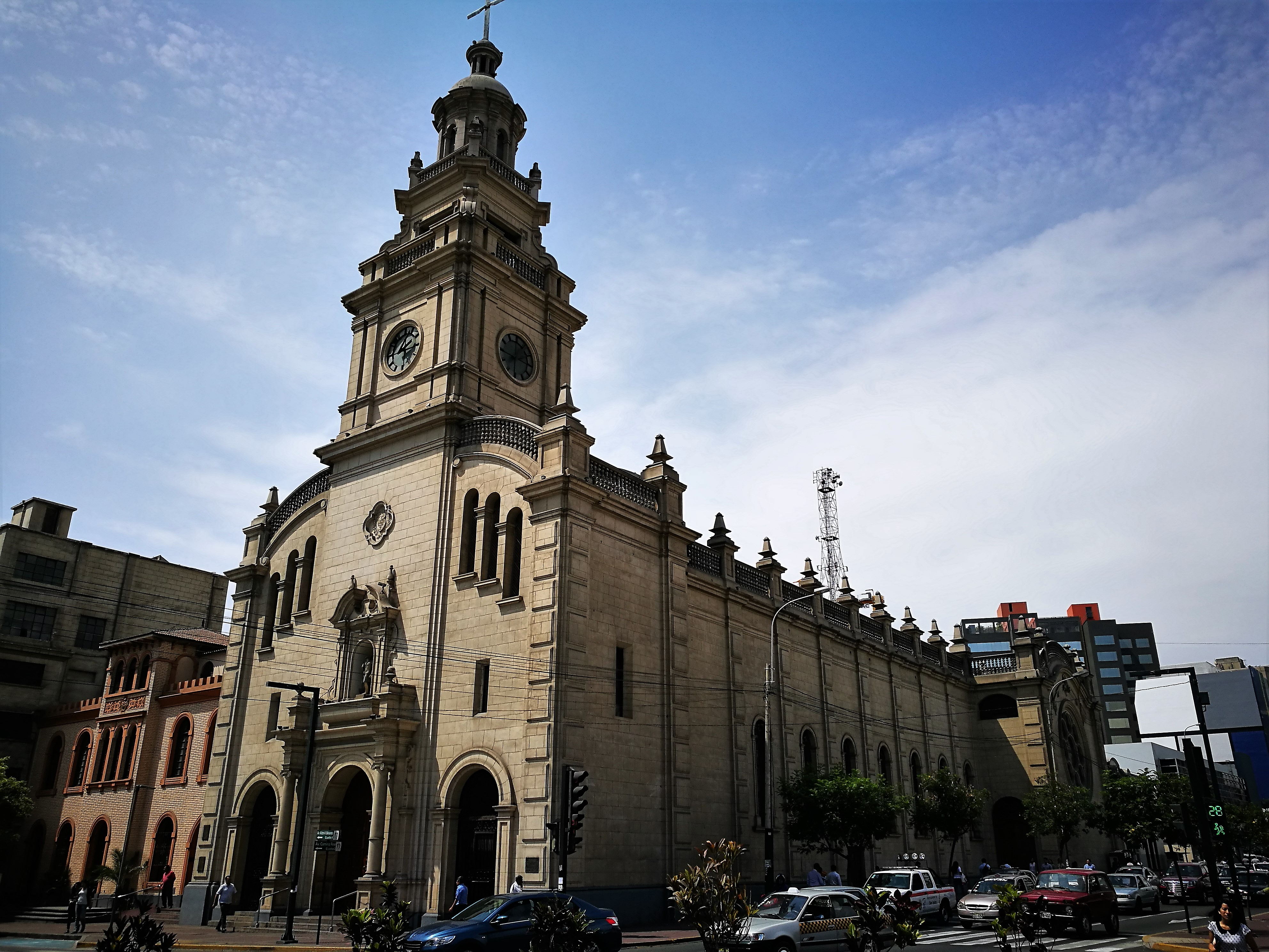 Parròquia de Nuestra Señora del Pilar a San Isidro, Lima